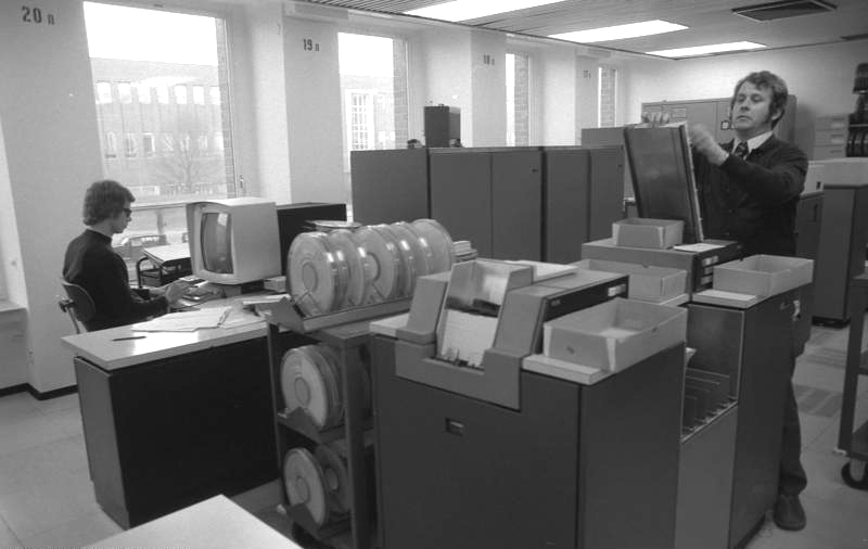 VW-Werk, Wolfsburg Datenverarbeitung